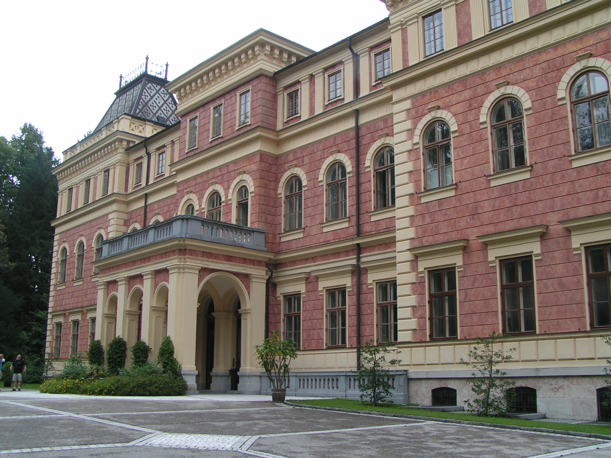 Schloss Traunsee (Bundesrealgymnasium in Gmunden)